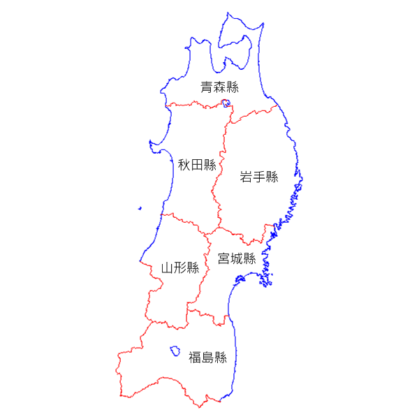 日本東北地方行政區域圖